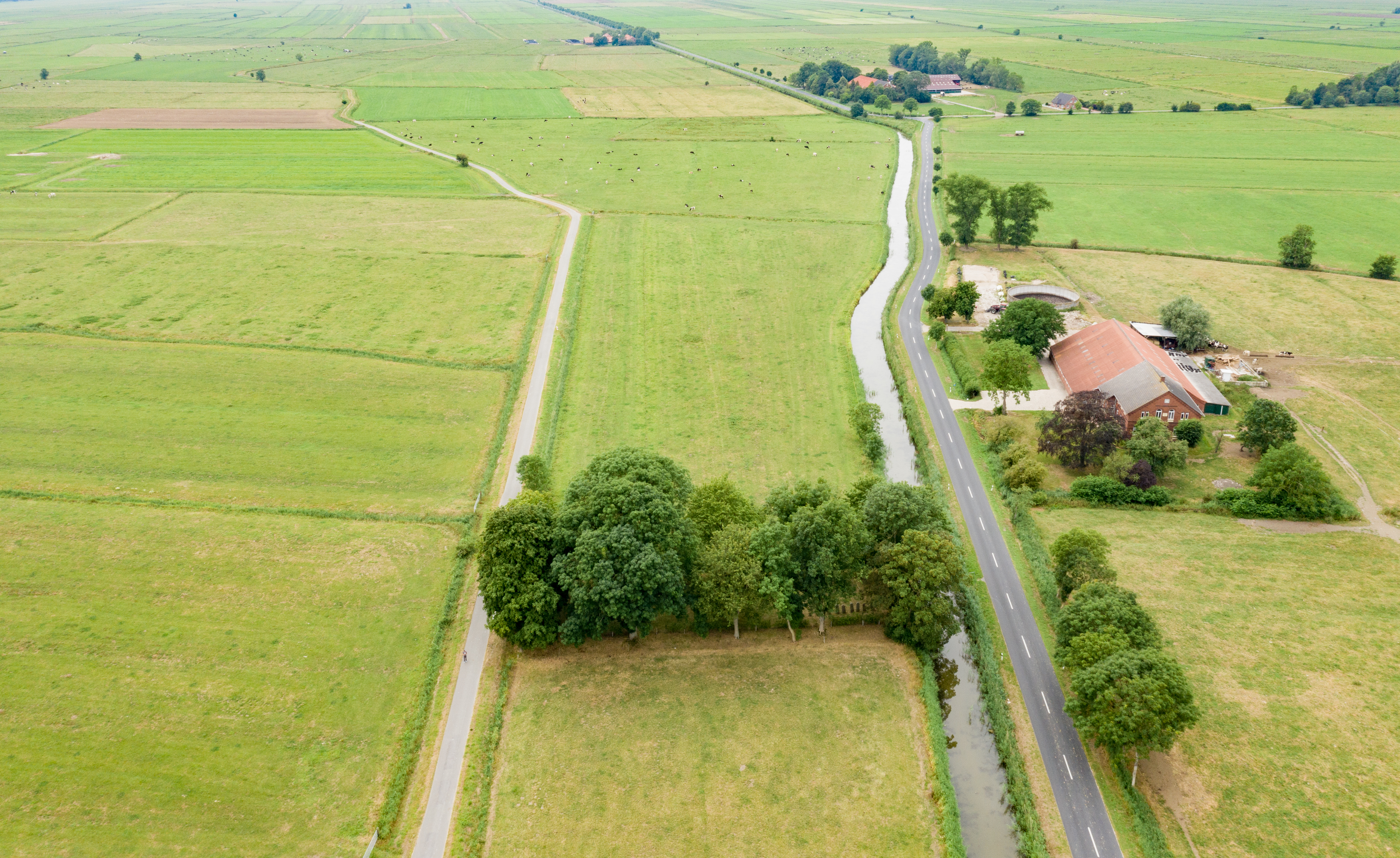 Der Jüdische Friedhof Jemgum liegt abseits des Ortes. Er ist ein Jüdischer Friedhof mit 13 Grabsteinen aus Sandstein aus dem Ende des 19. Jahrhunderts bis in die 30er Jahre des 20. Jahrhunderts; Anlage mit Bodenwölbung und umgebenden Baumbestand